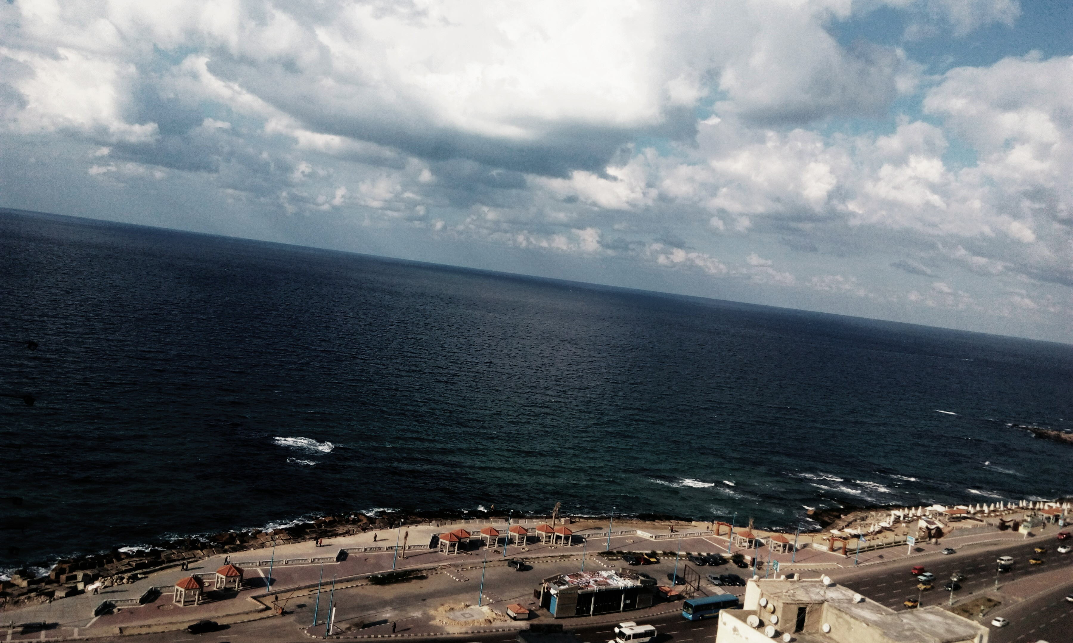 صورة لمدينة الإسكندريه، يظهر فيها شارع البحر (الجيش) من منطقة سبورتنج